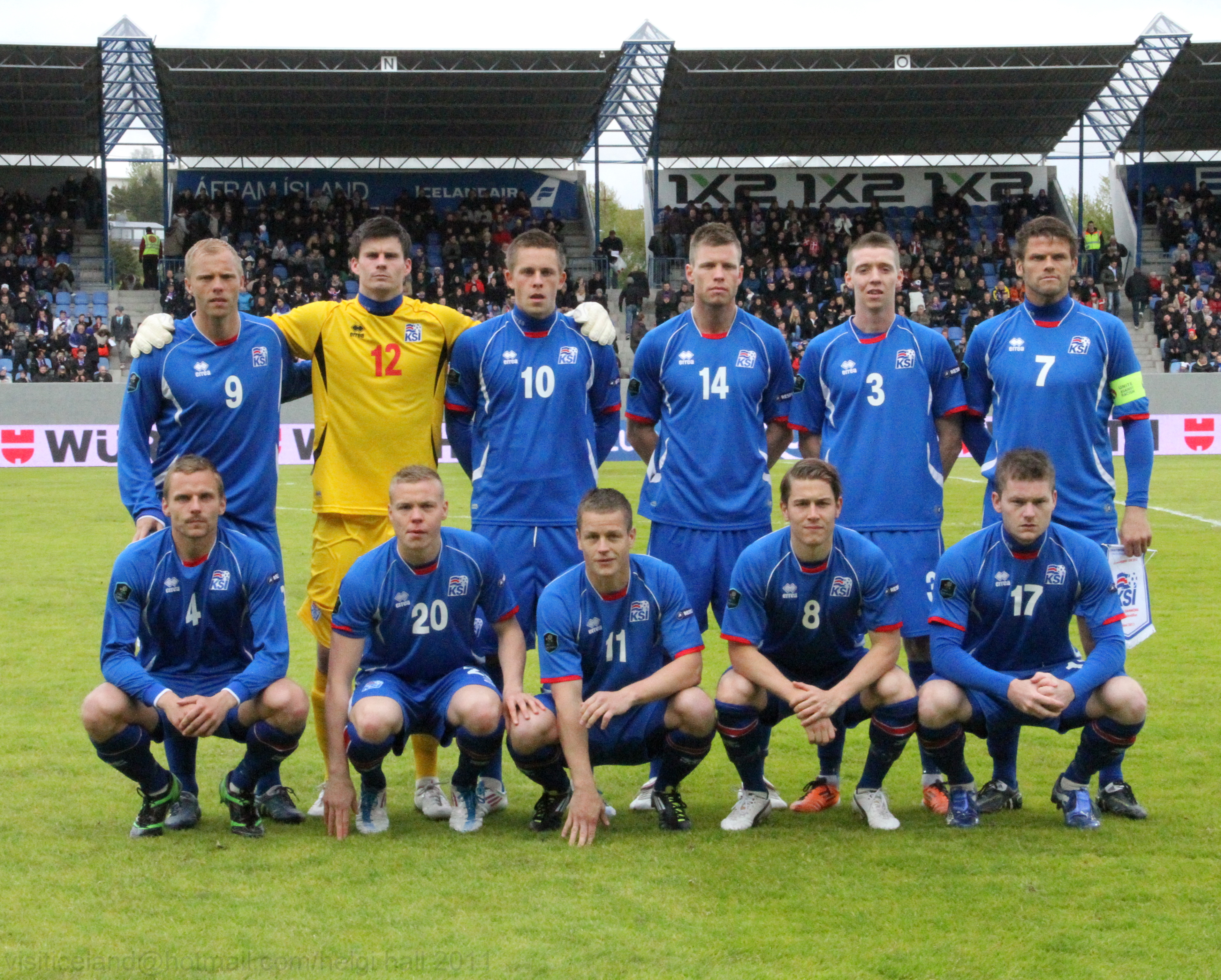 Iceland vs Denmark 4.6.2011